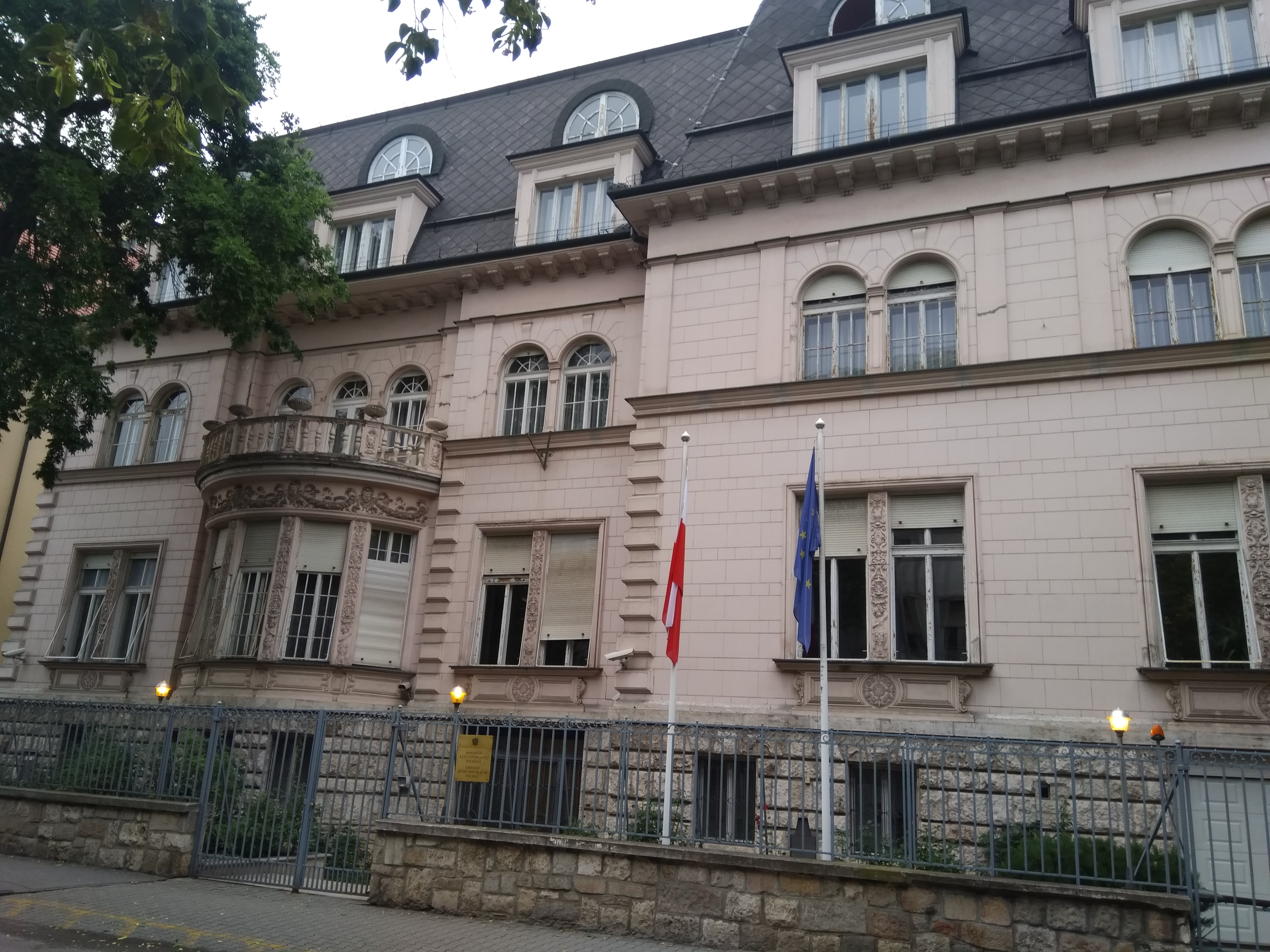 Ambasada RP w Budapeszcie